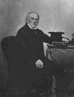 Vincenc Pavel Žák (1797 - 1867), Moravský národní buditel, spisovatel, překladatel a katolický kněz.